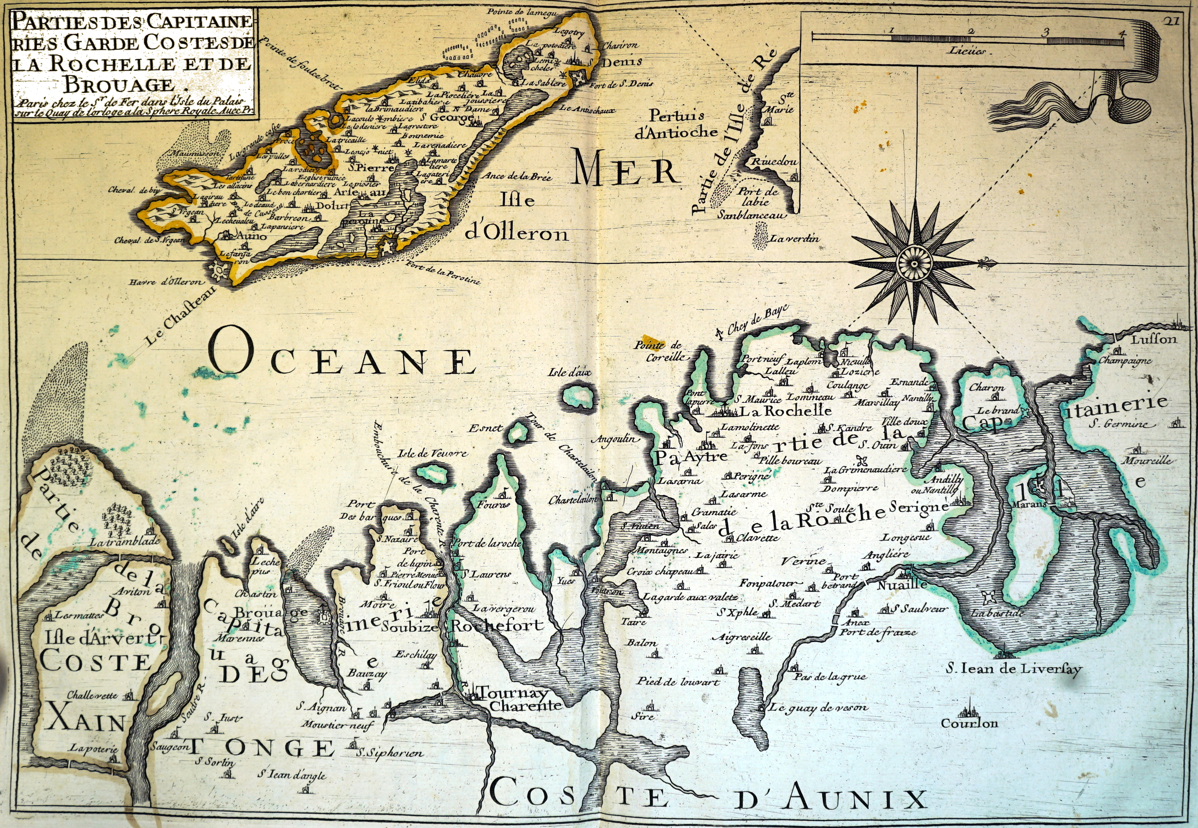 relevé par C. Tassin.